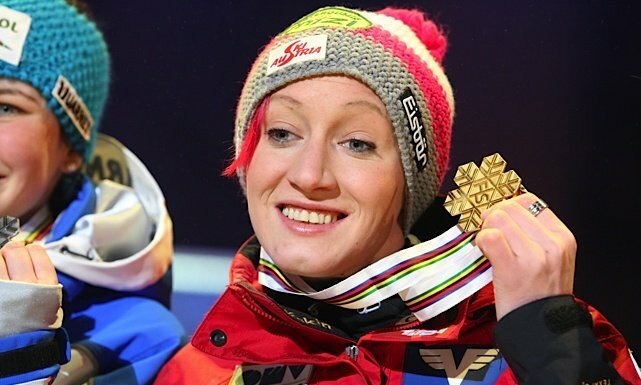 Daniela Iraschko podczas ceremonii medalowej po konkursie kobiet na Mistrzostwach Świata w Narciarstwie Klasycznym 2011 w Oslo.